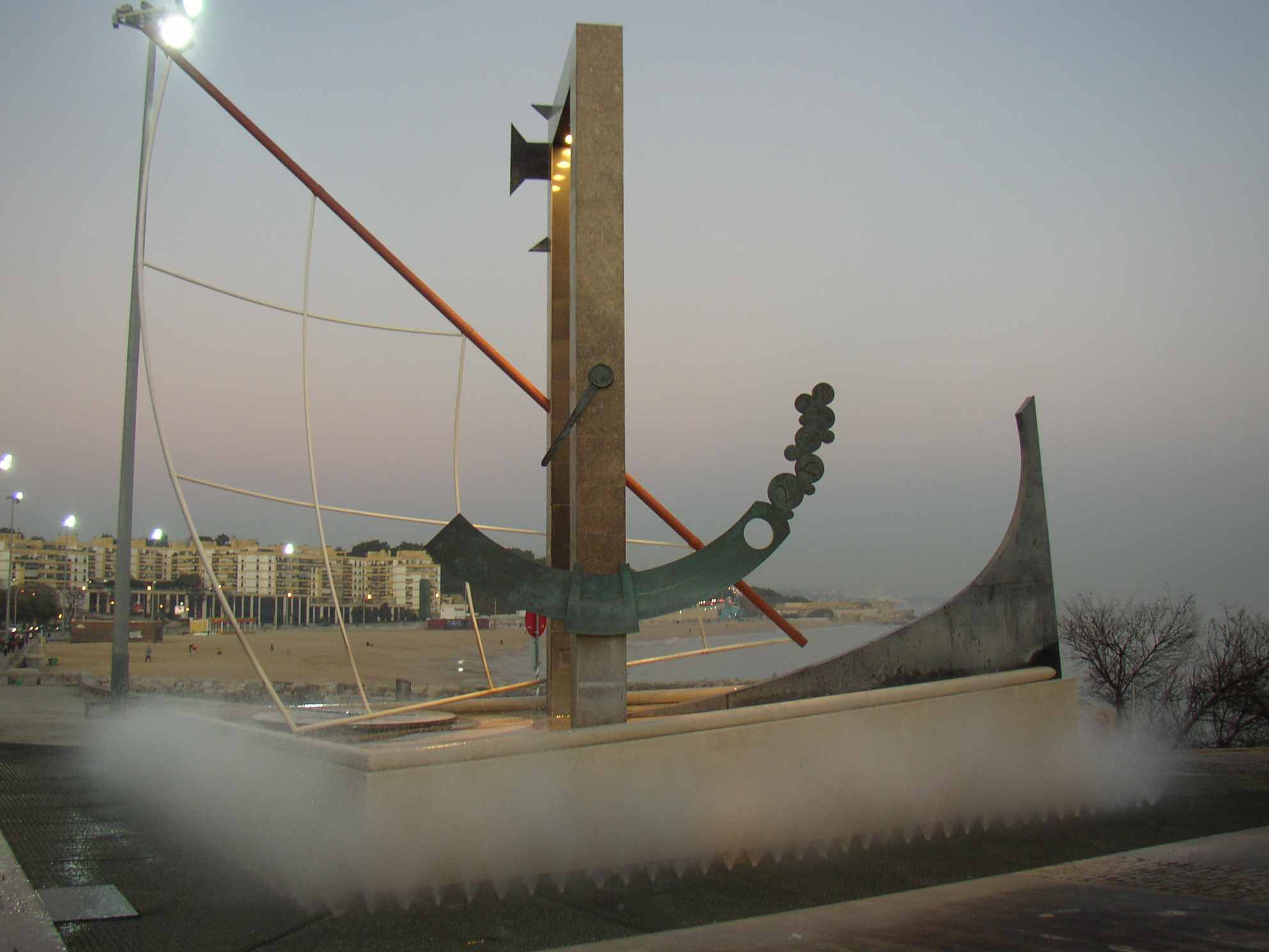 À porta do Mar - Nave visionista, obra pública de Luis Vieira-Batista em Santo Amaro de Oeiras